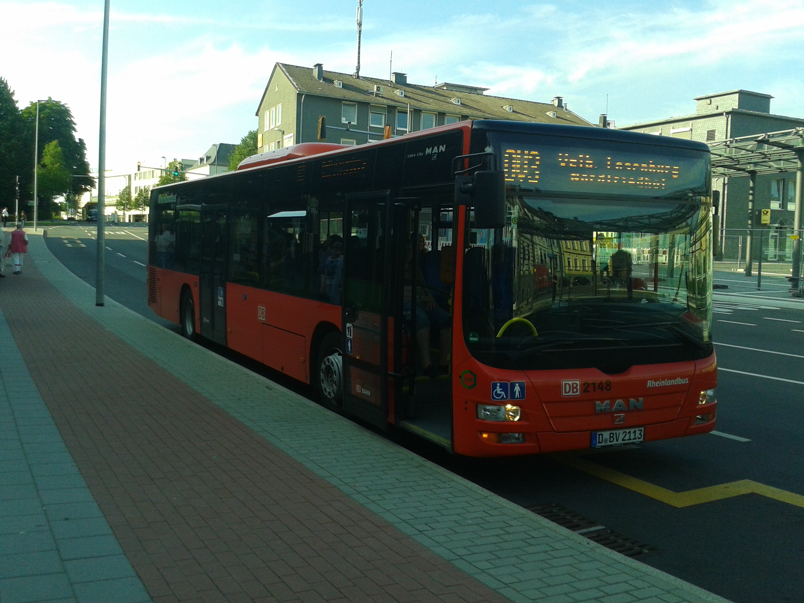 Ein anderer Velbertianer Ortsbus